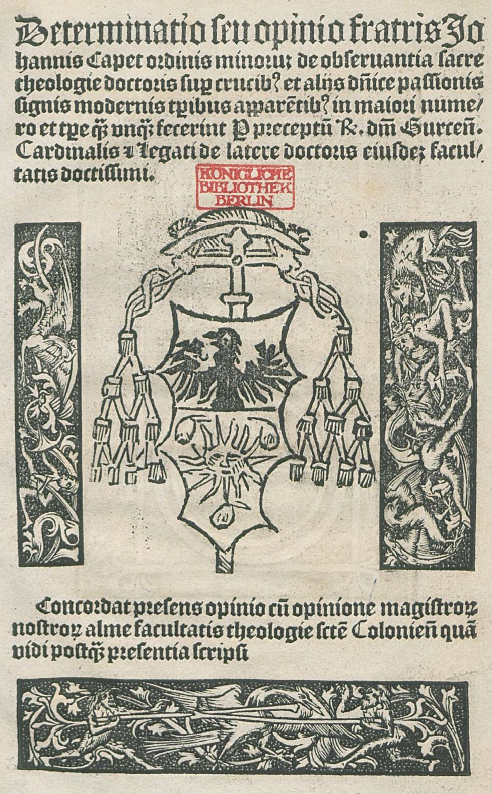 Determinatio seu opinio fratris Johannis Capet... Köln: Hermann Bungart